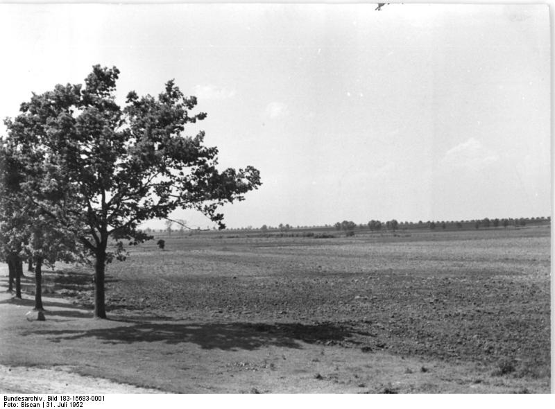 Wanzleben, Blick über den "Faulen See" Zentralbild Biscan 31.7.1952 113 Hektar Ödland werden kultiviert. Inmitten der fruchtbaren Magdeburger Börde liegt der 113 ha große Faule See bei Wanzleben, der zwar schon von Jahren trockengelegt, bisher aber noch nicht landwirtschaftlich genutzt wurde. Die Landesregierung von Sachsen-Anhalt hat nun die erforderlichen Mittel für die Kultivierung des Faulen Sees zur Verfügung gestellt und die MAS Domersleben beauftragt, die Arbeiten durchzuführen. Im nächsten Jahr werden den Bauern von Wanzleben, Schleibnitz und Buch 80 Hektar zusätzliches Weideland zur Verfügung stehen. 33 Hektar werden aufgeforstet. UBz: Blick über den Faulen See, eine 113 Hektar große, vollkommen öde Fläche. Der Boden ist so stark salzhaltig, daß bisher nichts auf ihm gedieh.